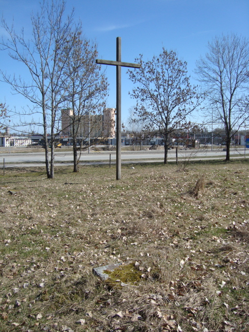 Ånsta kyrka är en ruin av en medeltida kyrka i Aspholmen-Nasta sydväst om Örebro